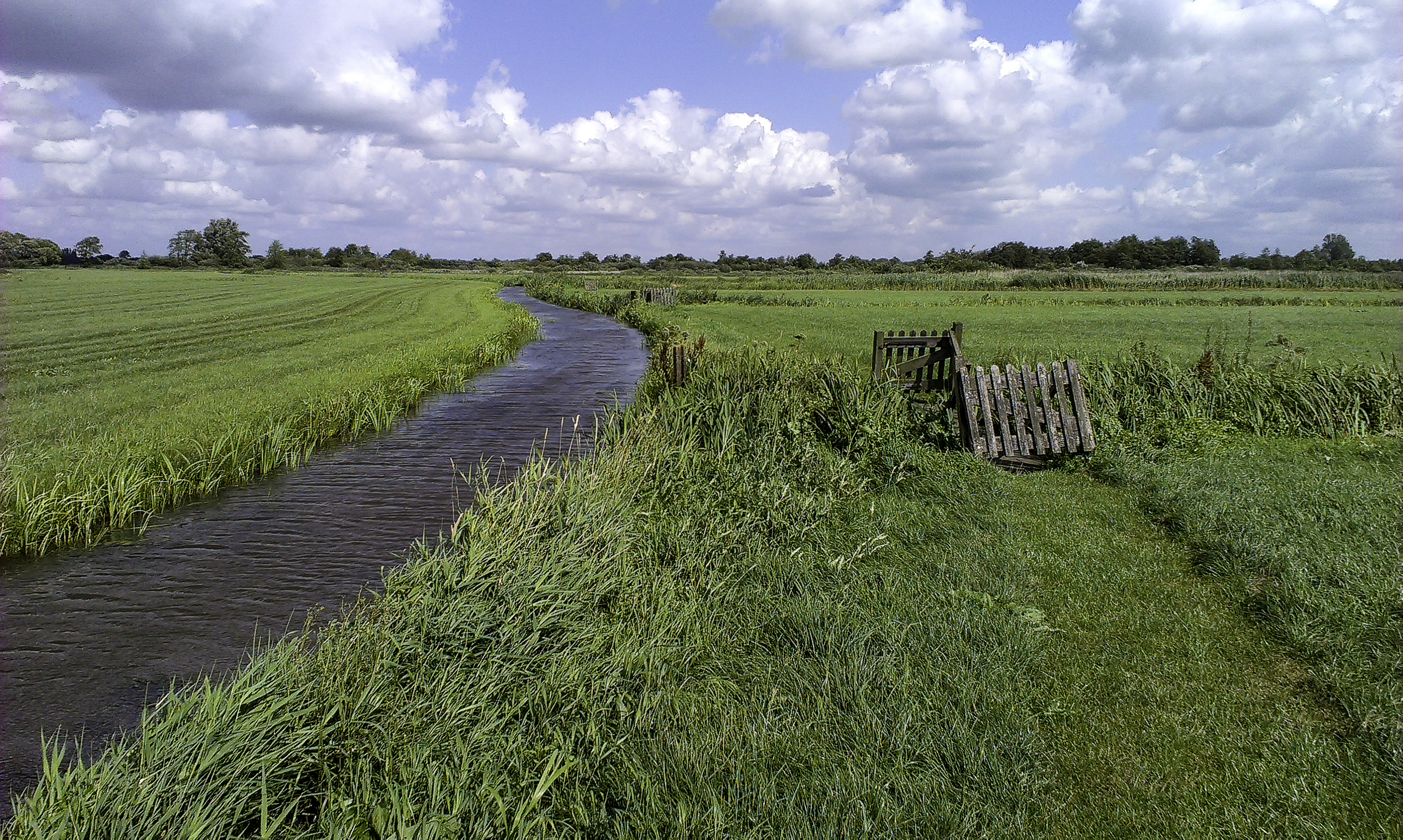 Lauwers bij Peebos